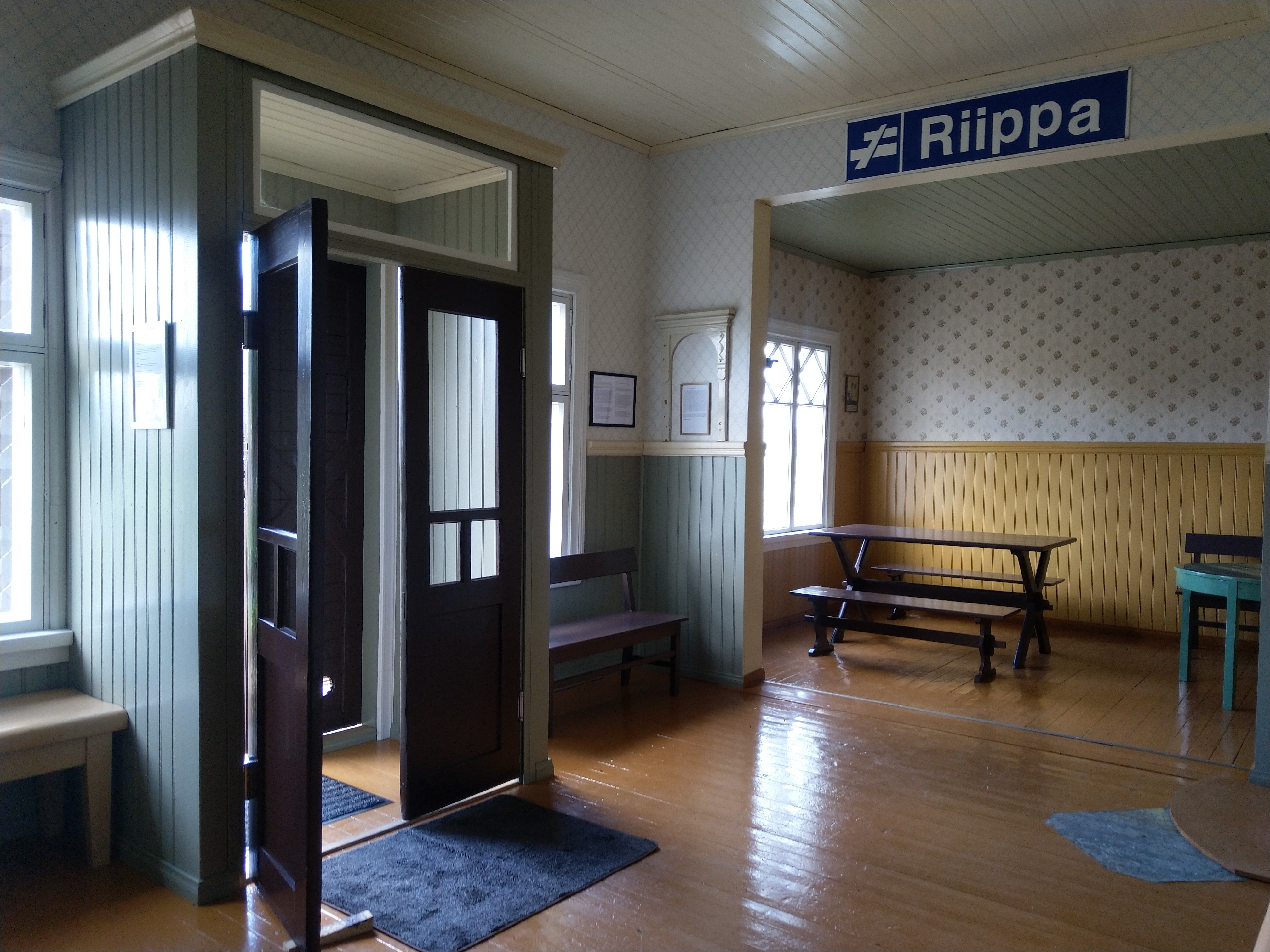 Valouva Humppilan aseman sisätiloista, Riippa-kyltti on muisto ajalta kun rakennus oli Riipassa